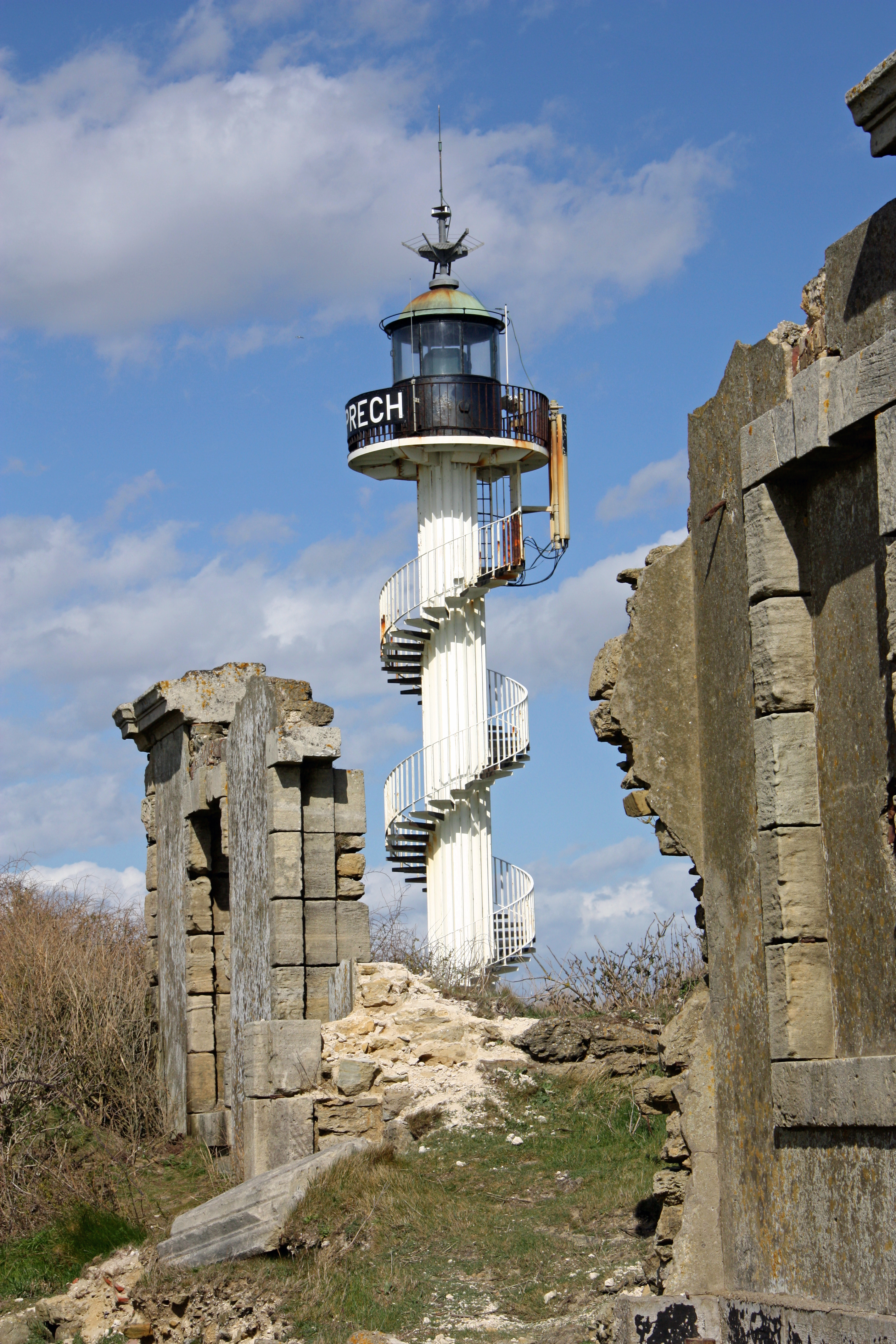 Parc naturel régional des Caps et Marais d'Opale - Côte d'Opale - Phare d'alprech et reste de l'ancien sémaphore tombé de la falaise suite à l'érosion.